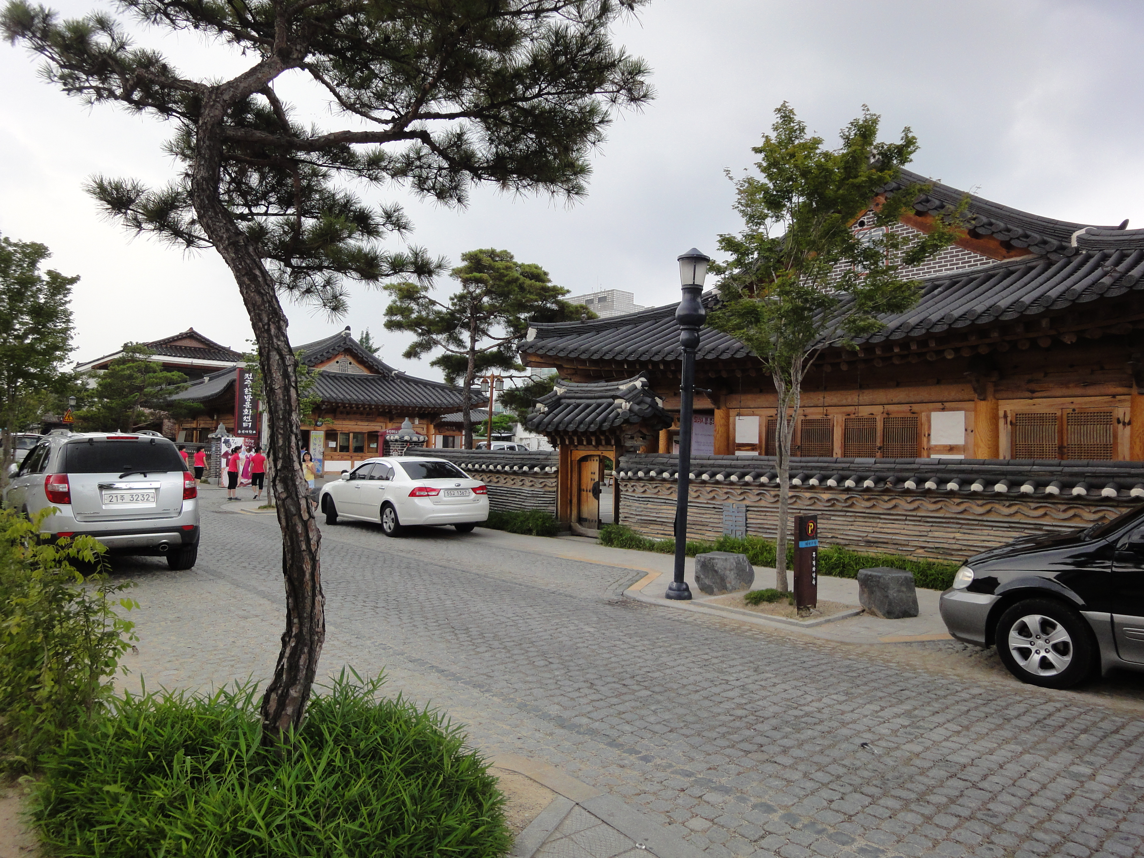 전주한옥마을의 전경.